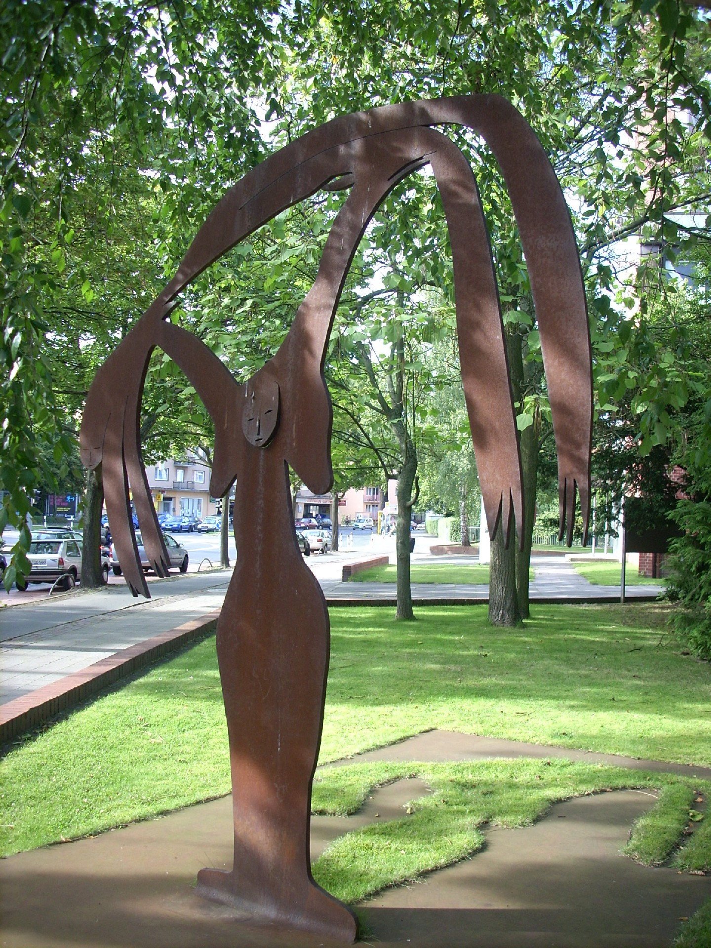 St. Albertus Magnus, Braunschweig, Menashe Kadishman, Pietà, 1999